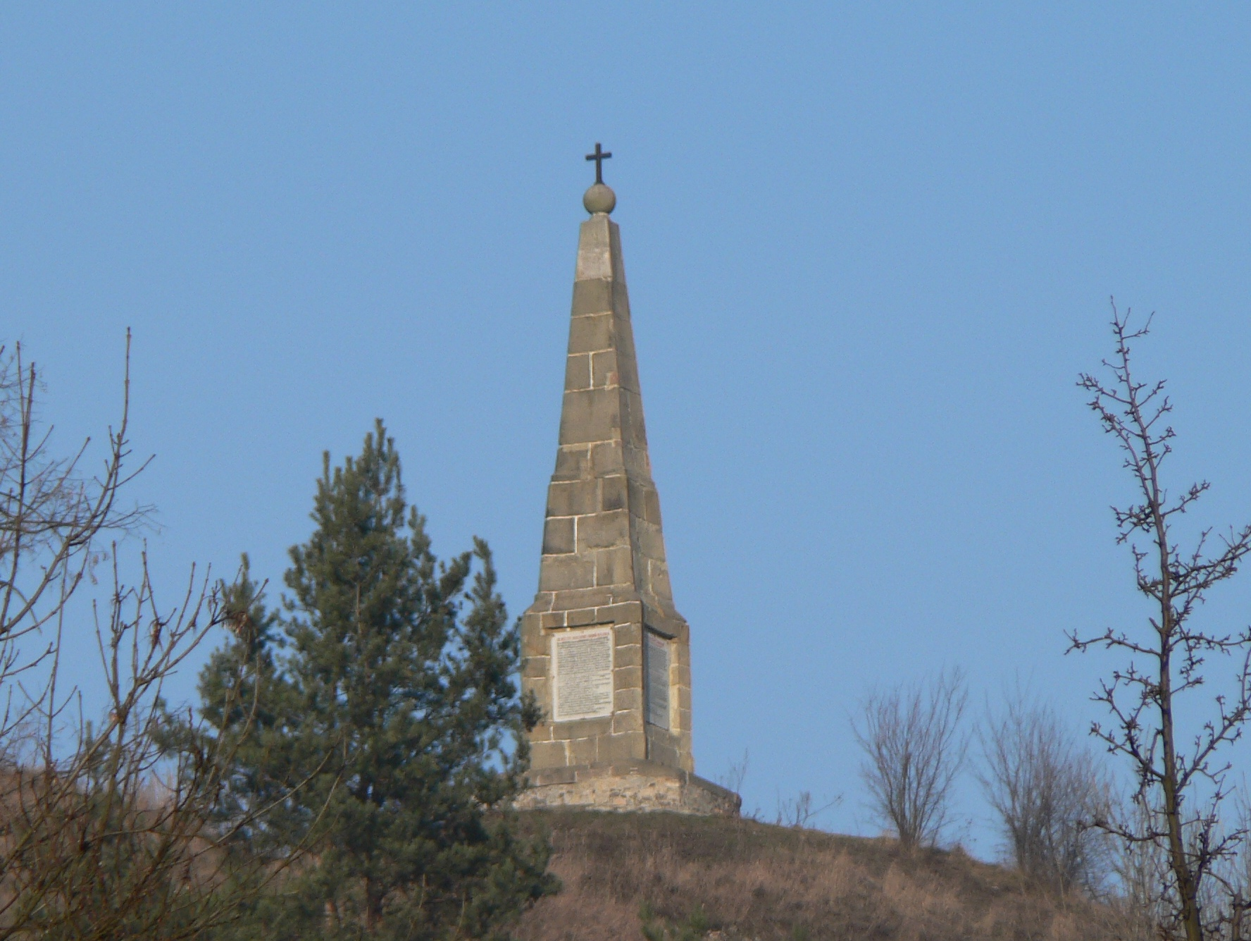 Památník dokončení železnice